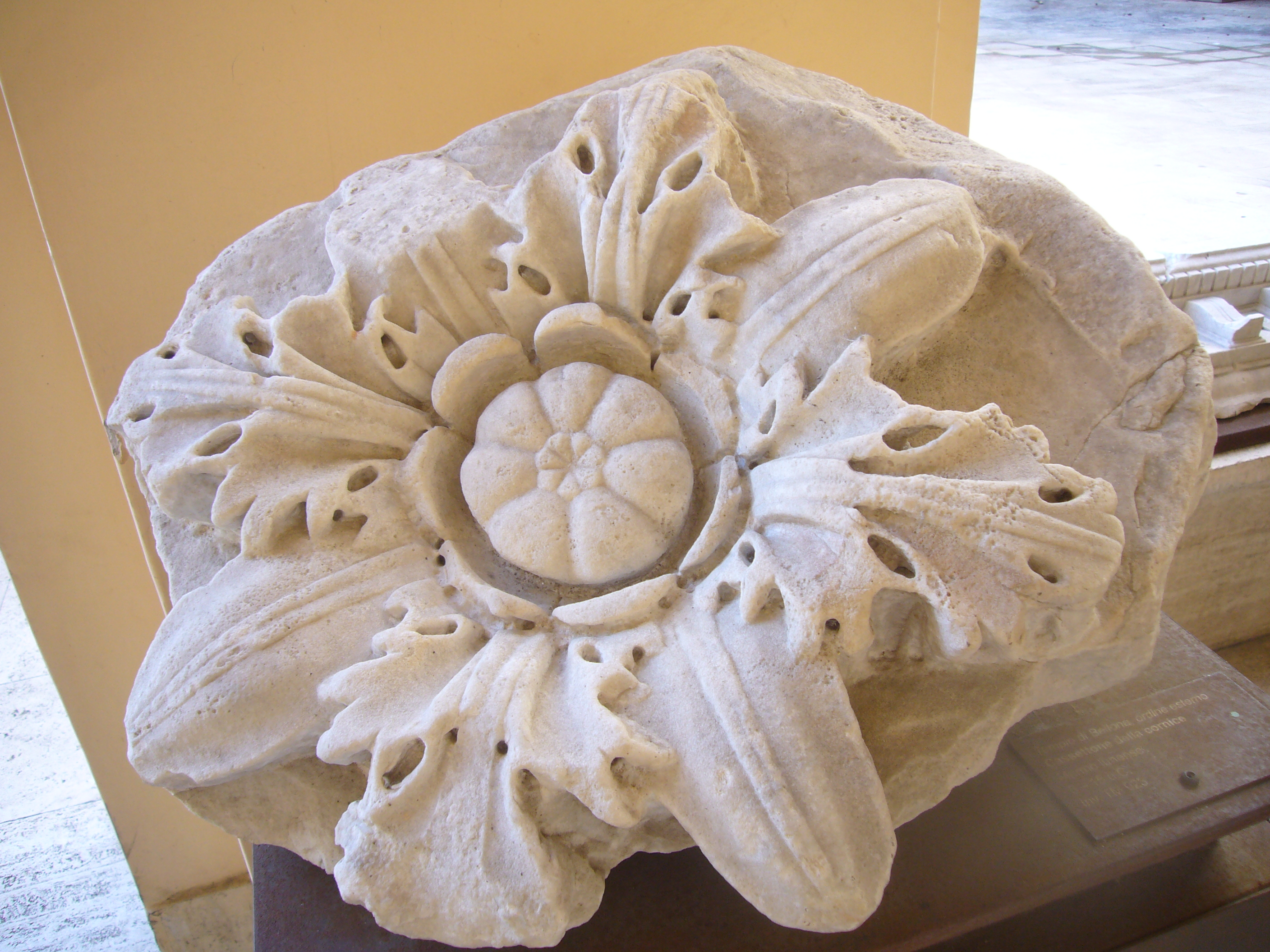 Roma. Cassettone della cornice dal tempio di Bellona. Nella loggia della casa di Flaminio Ponzio ricostruita a piazza Campitelli.